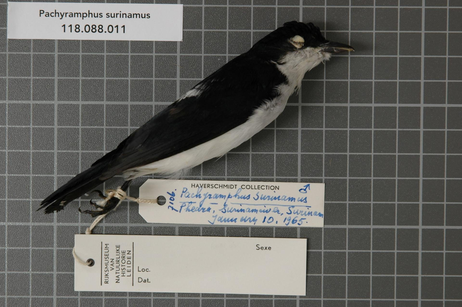 Pachyramphus surinamus (Linnaeus, 1766)